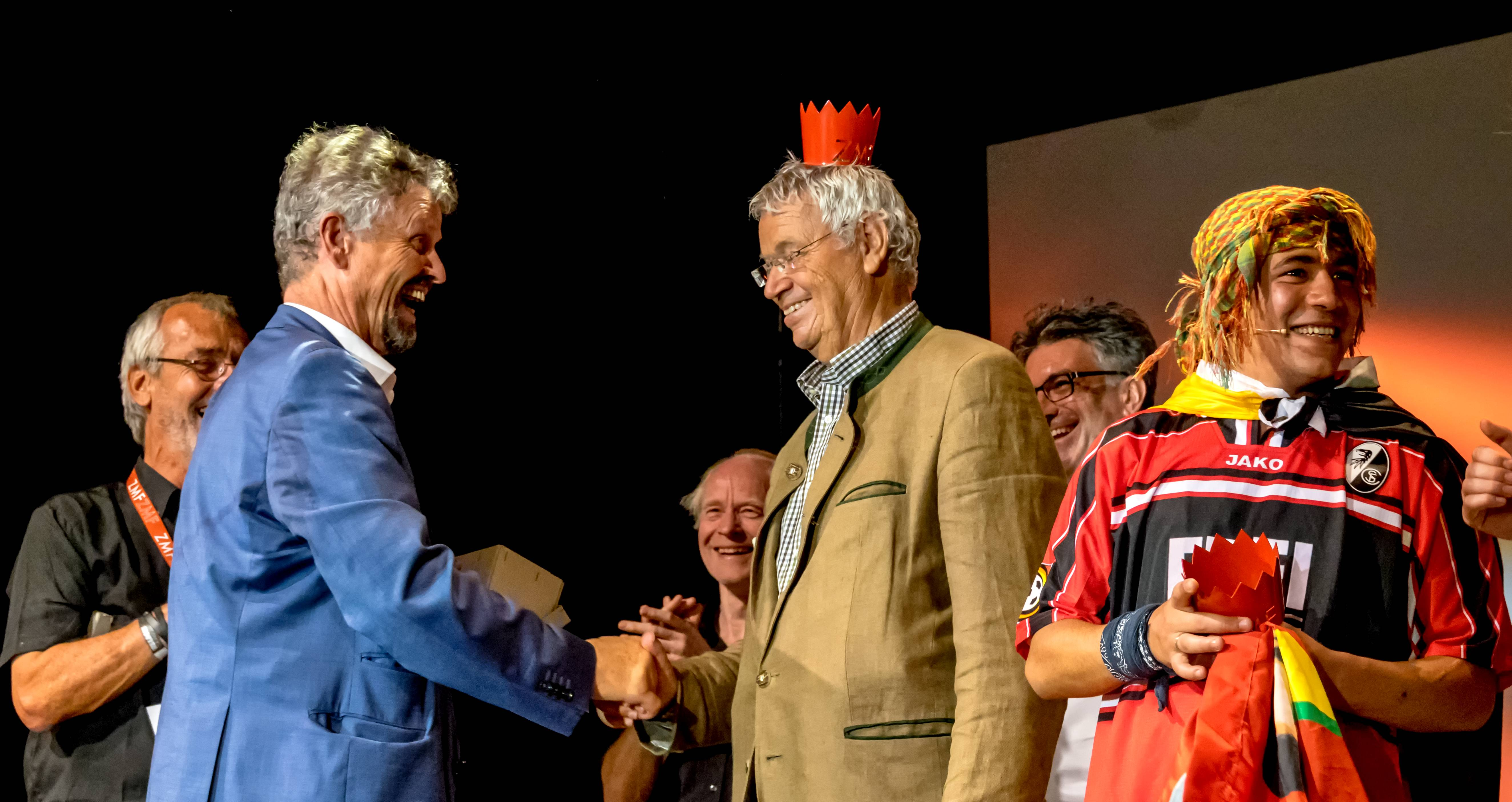 Bilder vom ZMF 2015 Die Gala. am 12. 07. 2015 Verleihung des Ehrenpreises des ZMF's an Gerhard Polt durch den MDB Gernot Erler